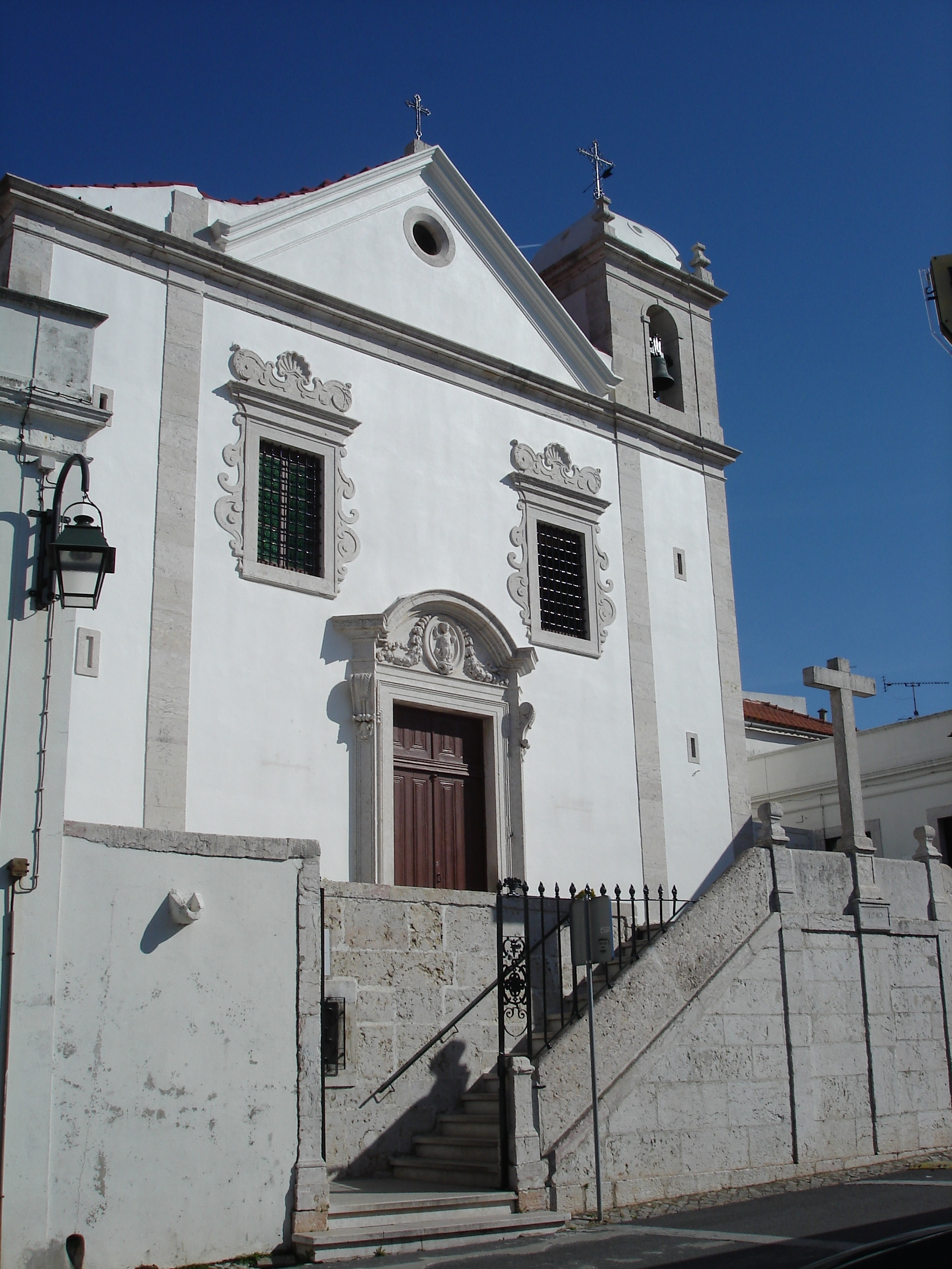 Foto da Igreja Matriz de Odivelas